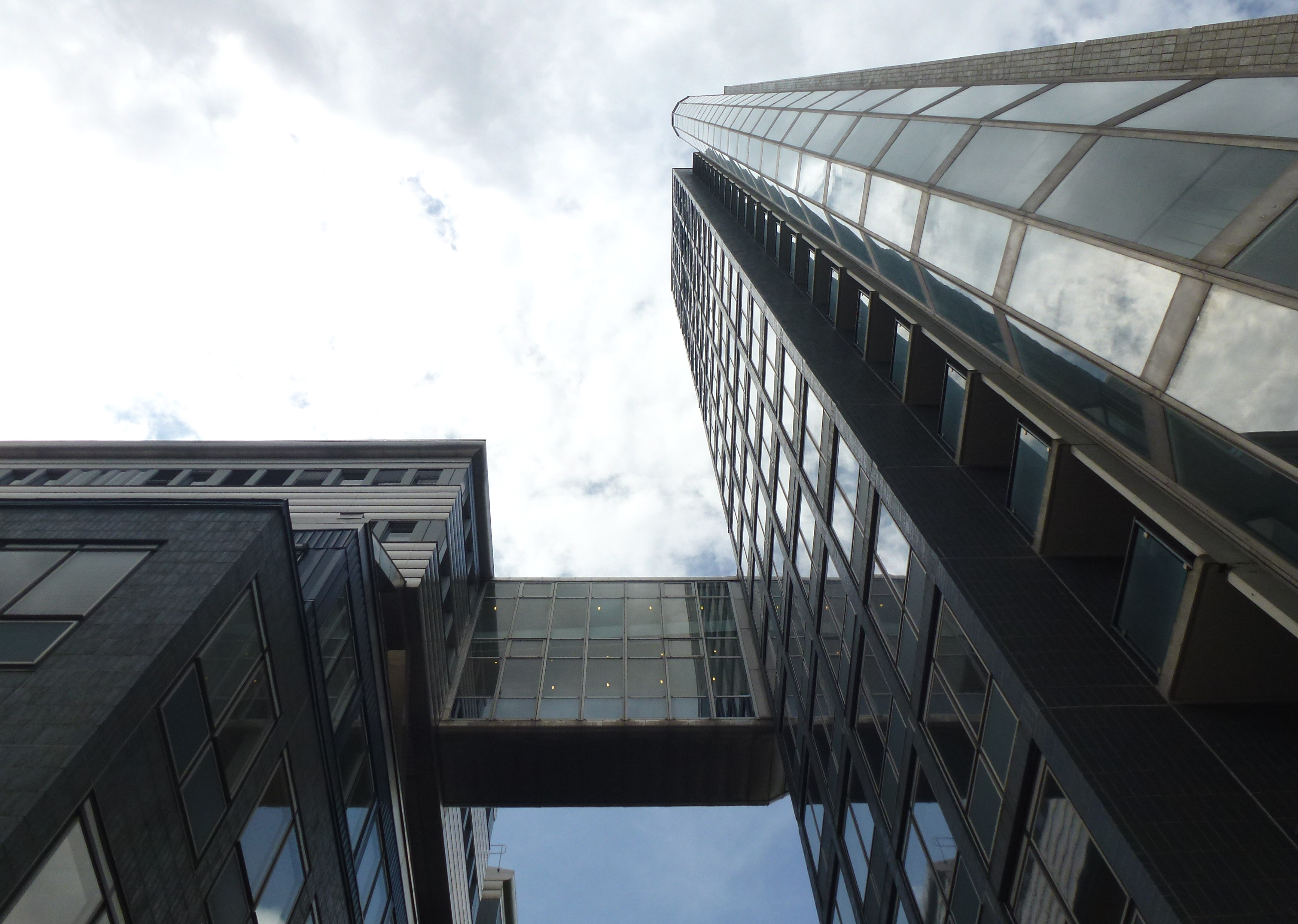 Dagens Nyheter byggnad